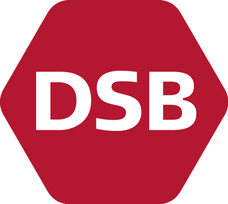 Logo Danske Statsbaner, in Gebrauch seit September 2014